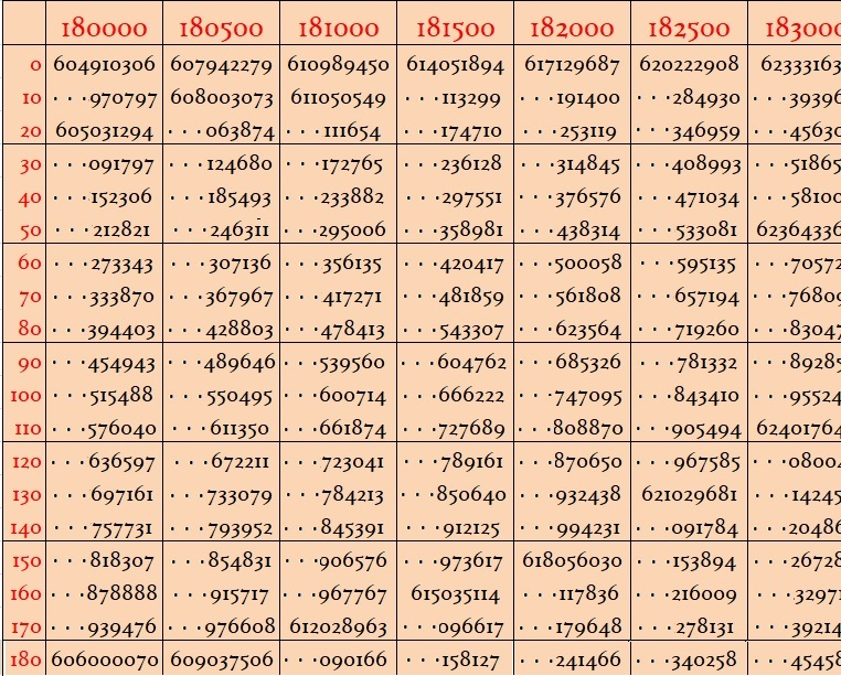 Fac simile d'un extrait des tables de Bürgi réalisé à l'aide d'un tableur et d'un logiciel de traitement d'images.